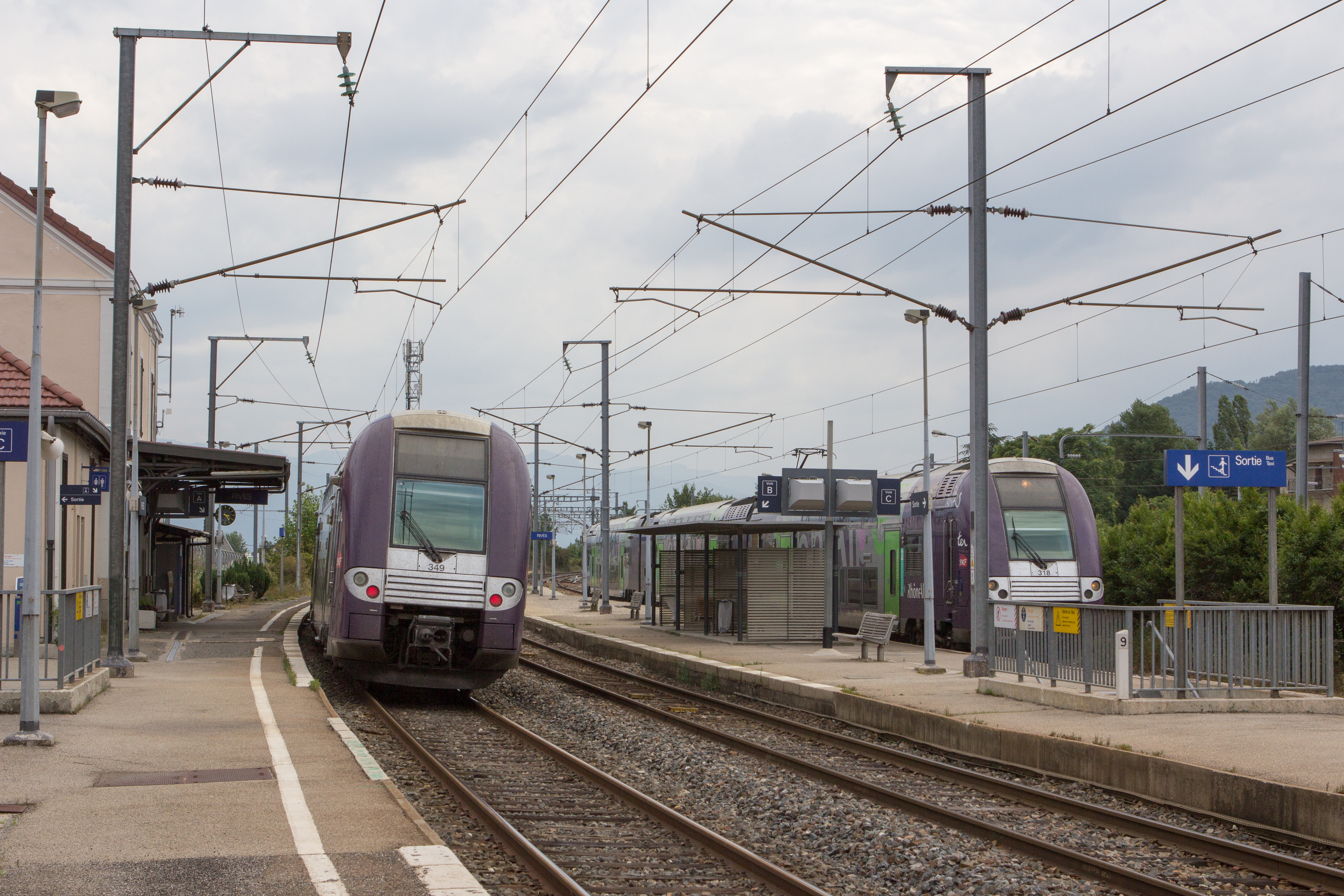 Z24500 en gare de Rives / Rives, Isère, France